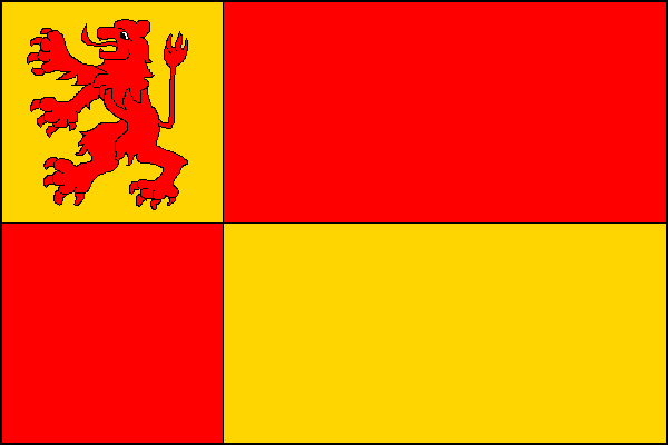 vlajka, Obyčtov, okres Žďár nad Sázavou